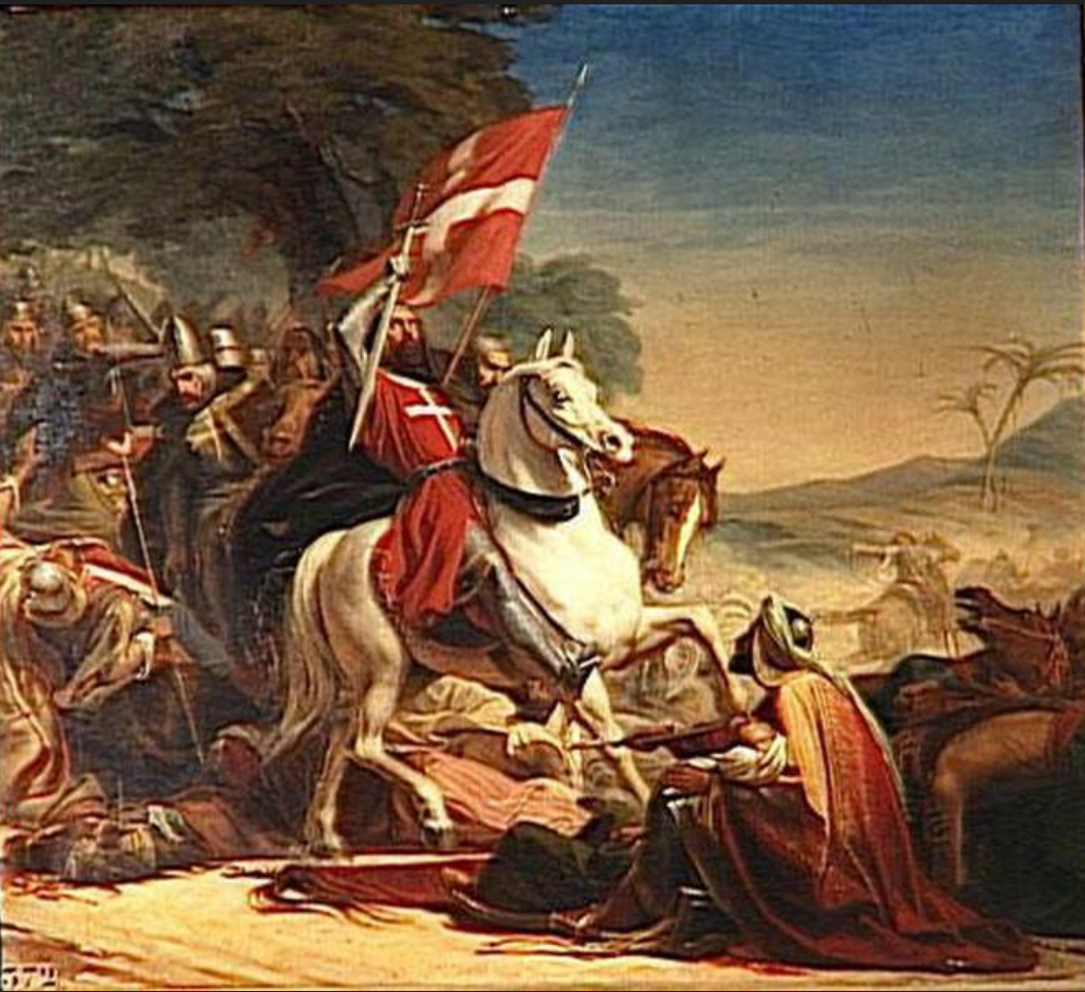 tableau de 1844 d'Edouard Cibot (1799-1877) commandé par Louis-Philippe pour le musée historique de Versailles